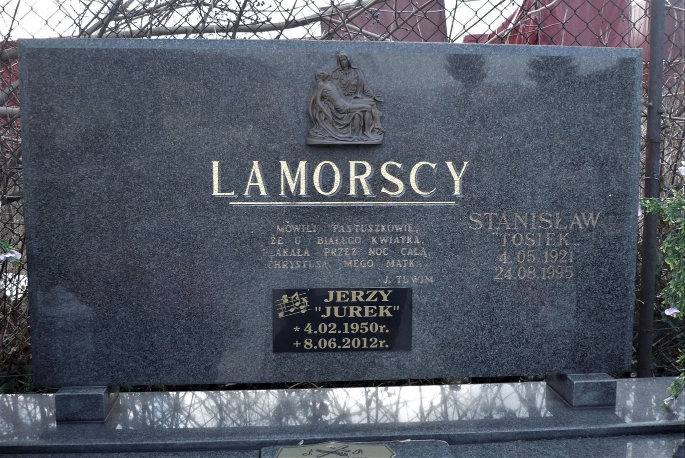 Cmentarz w Nowej Rudzie Lamorski